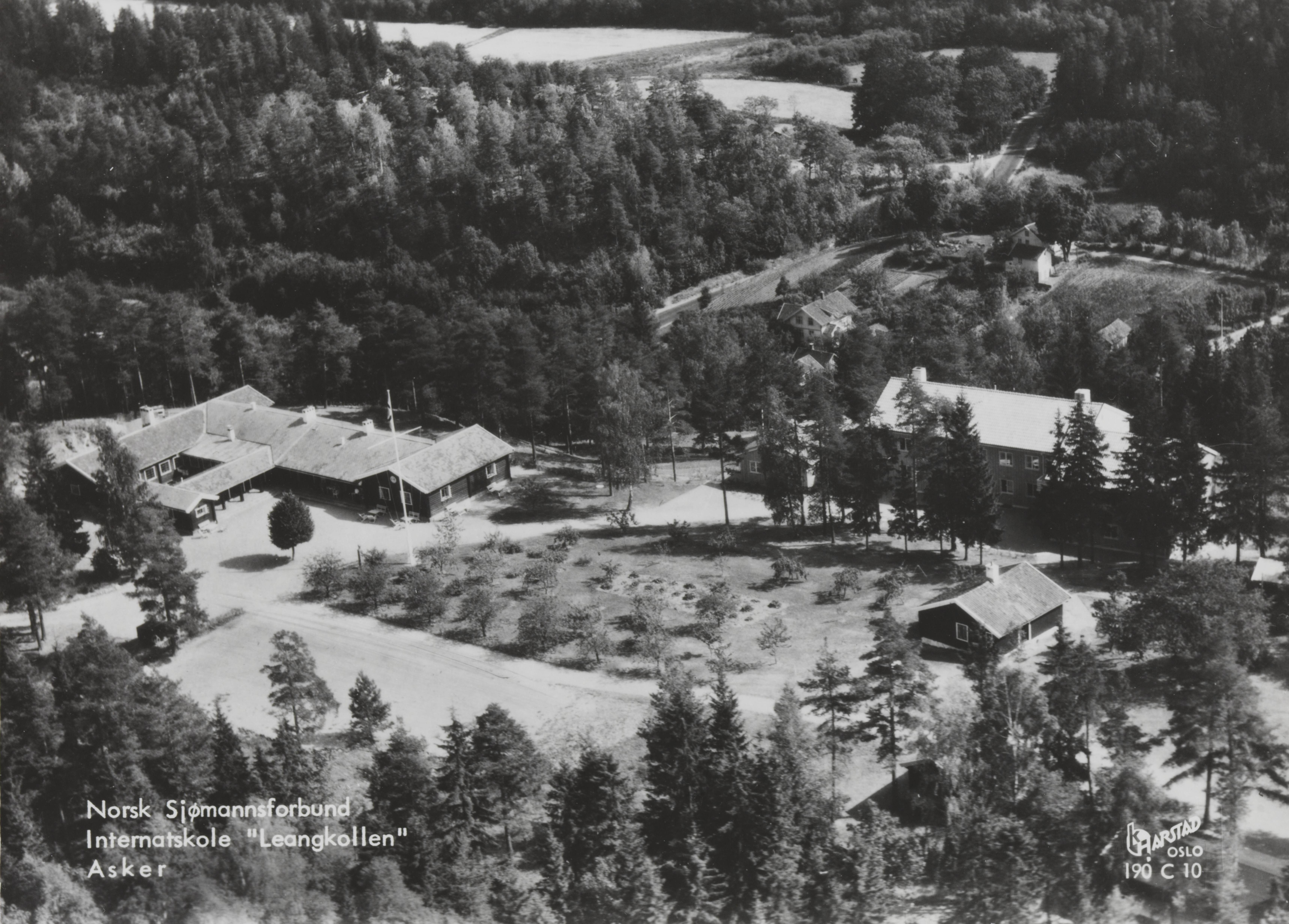 Bildet er hentet fra Nasjonalbibliotekets bildesamling Leangkollen, Asker, Akershus